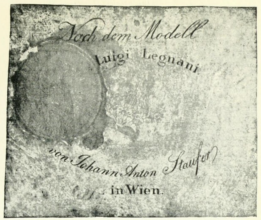 Gitarrenzettel "Nach dem Modell von Luigi Legnani von Johann Anton Staufer in Wien"